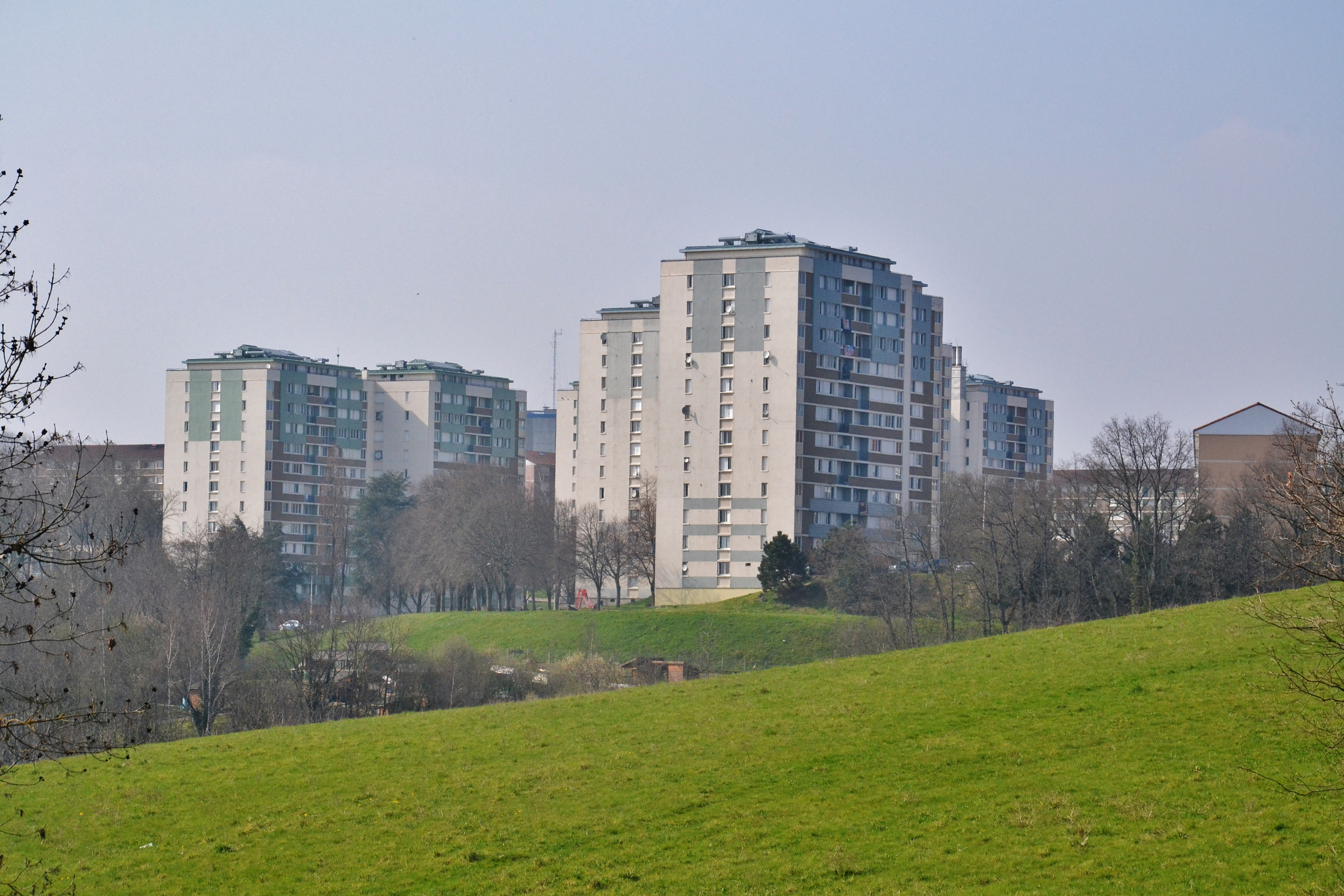 Immeubles de la cité de la Bastide à Limoges (Haute-Vienne, France)